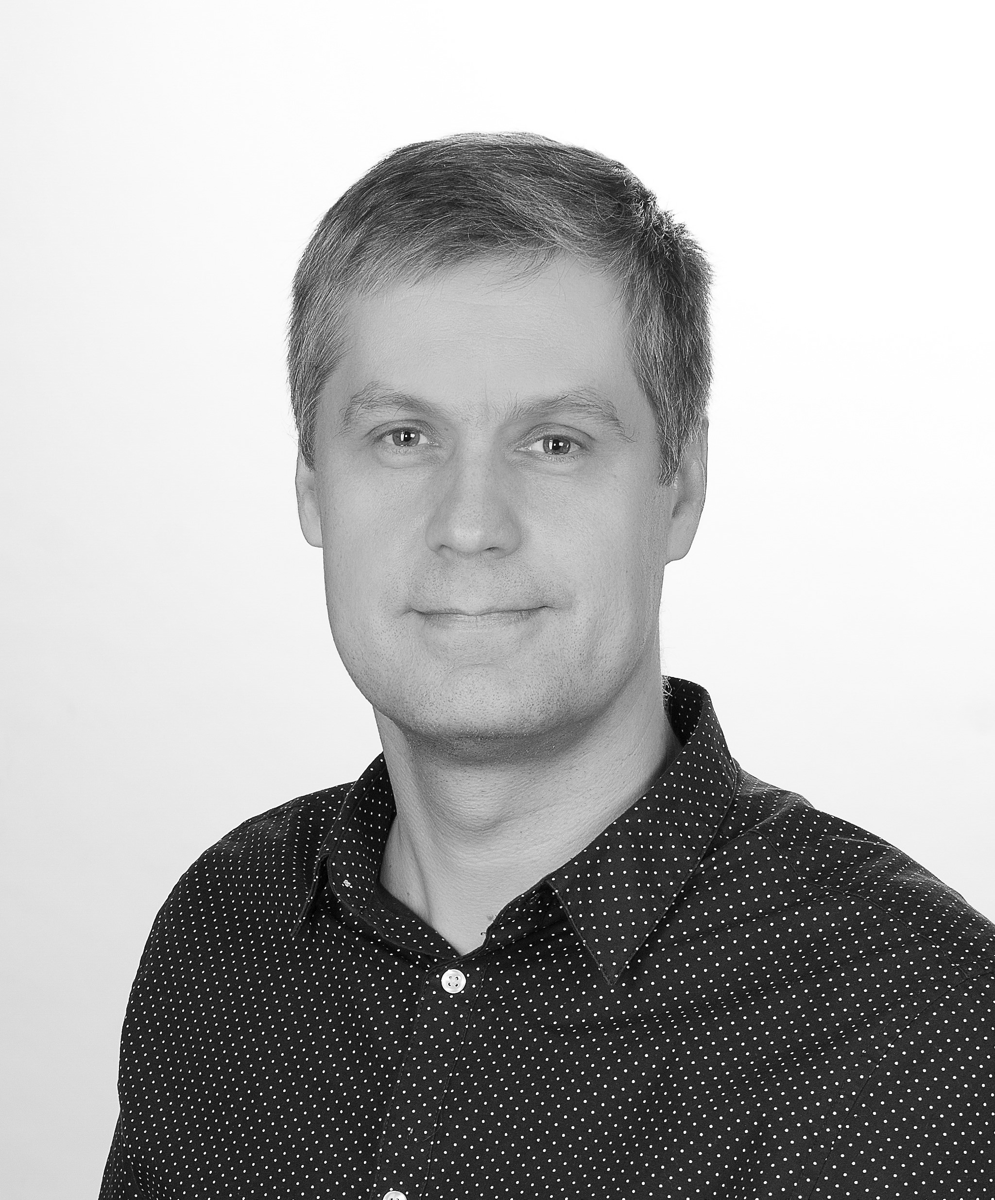 Taavi Kangur